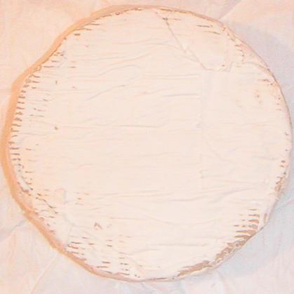 Brie Triple Cream